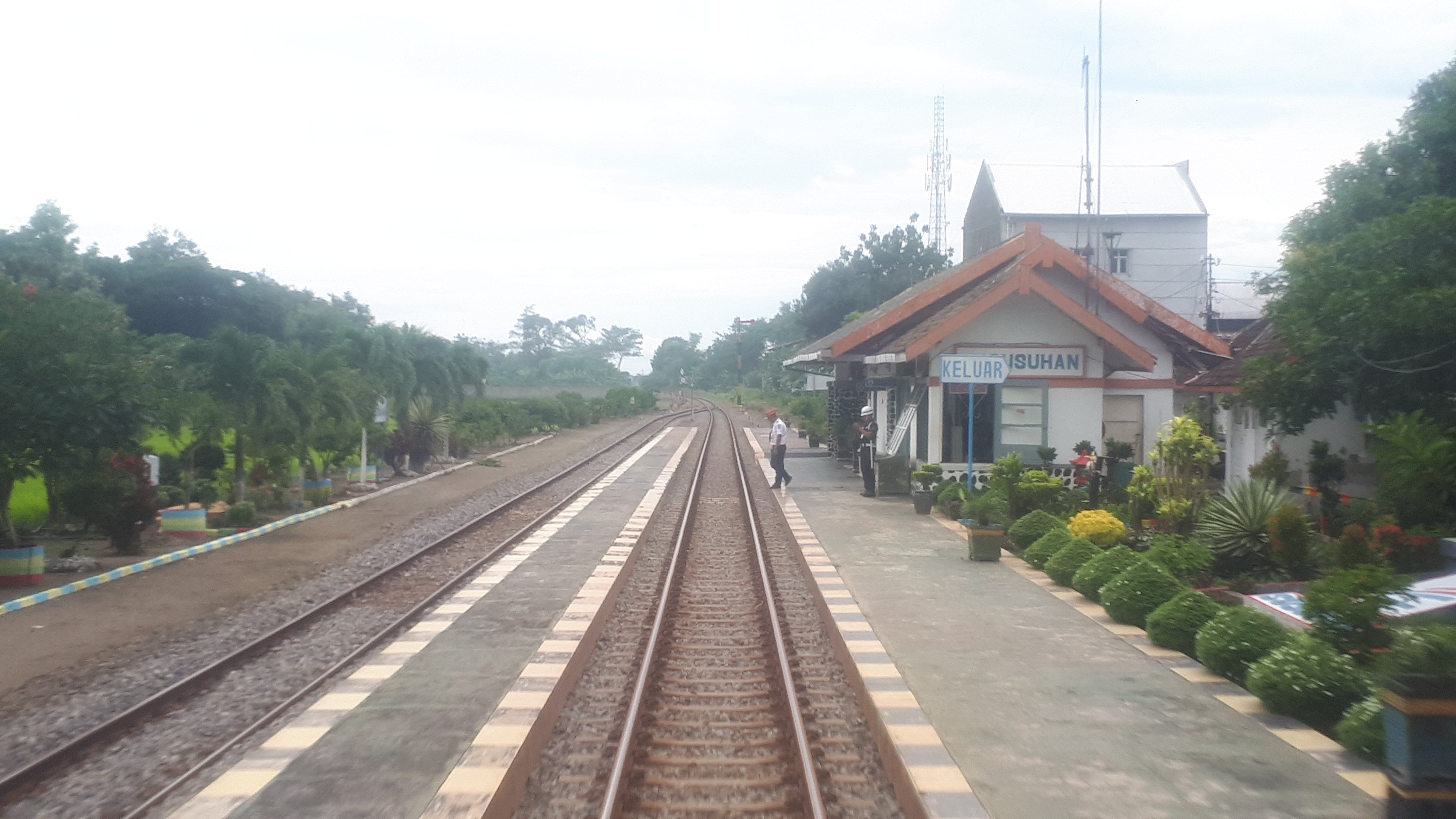 Emplasemen Stasiun Susuhan pada tahun 2020